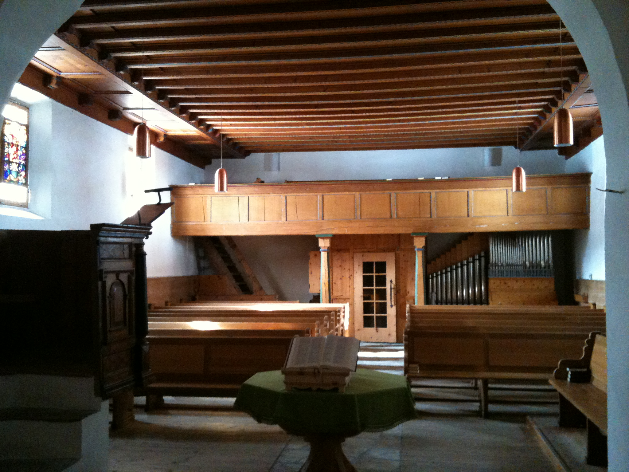 Kirche Sils Baselgia (Oberengadin, Kanton Graubünden), Innenansicht